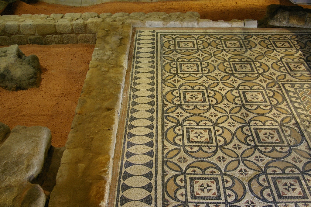 "Casa do Infante" museum in Porto, Portugal